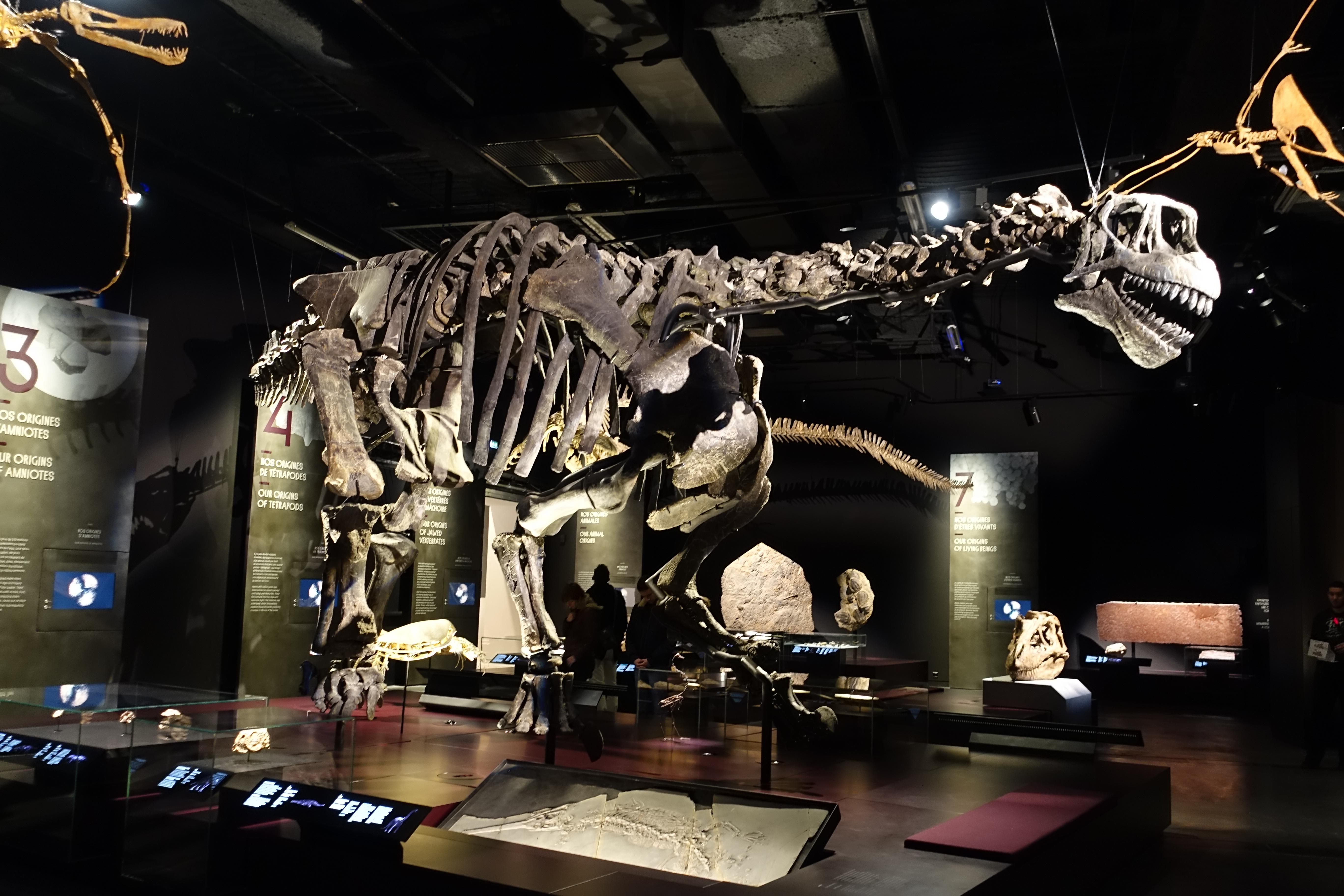 Camarasaurus au Musée des Confluences de Lyon le 20 12 2014